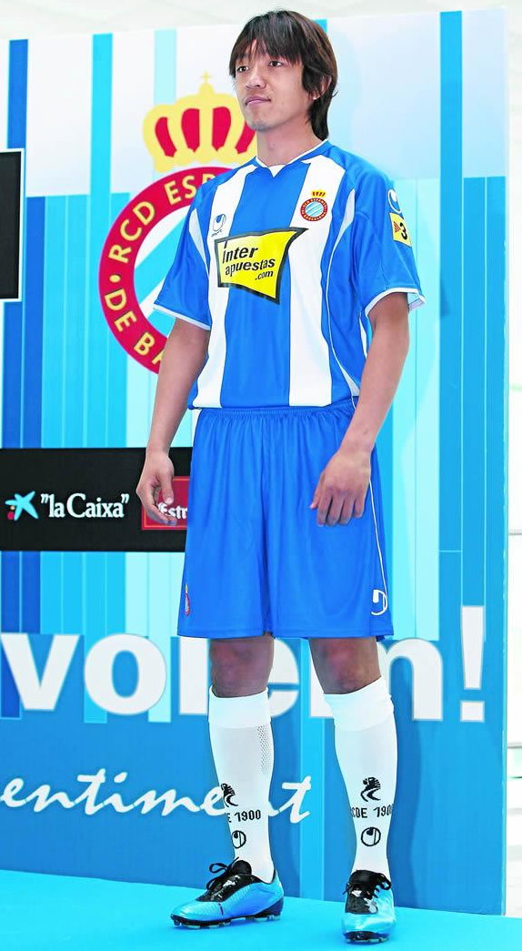 Fotogradia de Shunsuke Nakamura con la camiseta del RCD Espanyol de Barcelona